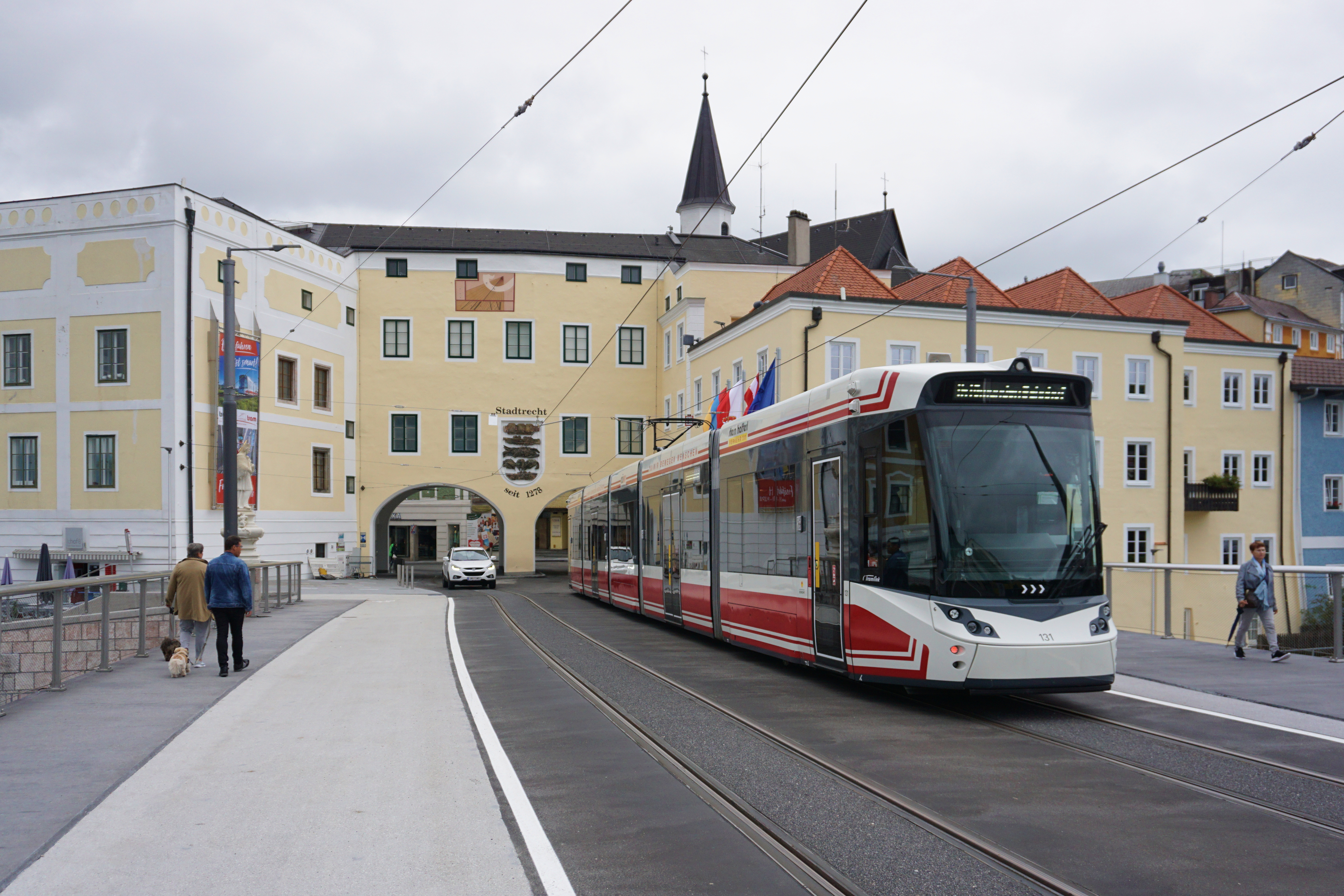 ET131 der Traunseetram auf der Traunbrücke Gmunden vor dem Trauntor auf der Fahrt in Richtung Gmunden Bahnhof